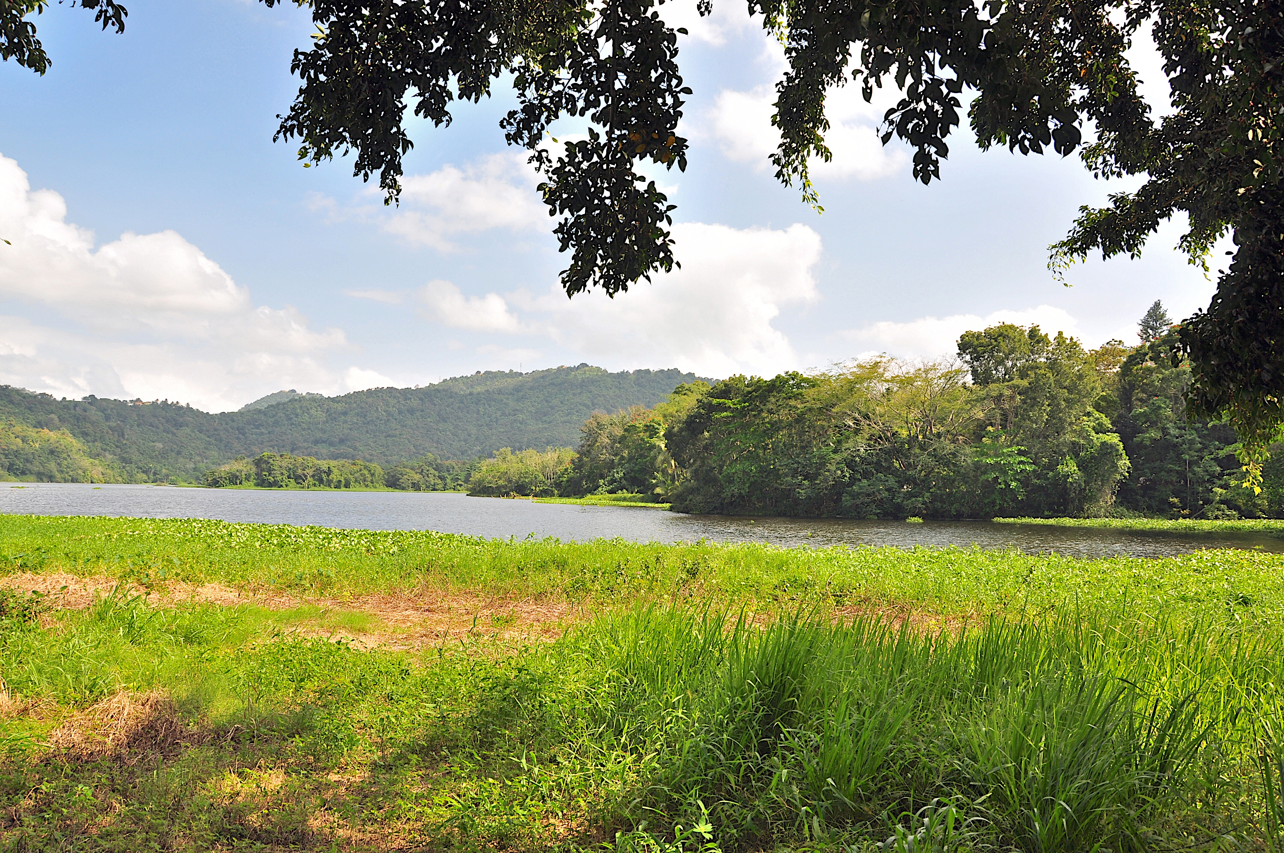 Carraízo, Trujillo Alto, Puerto Rico